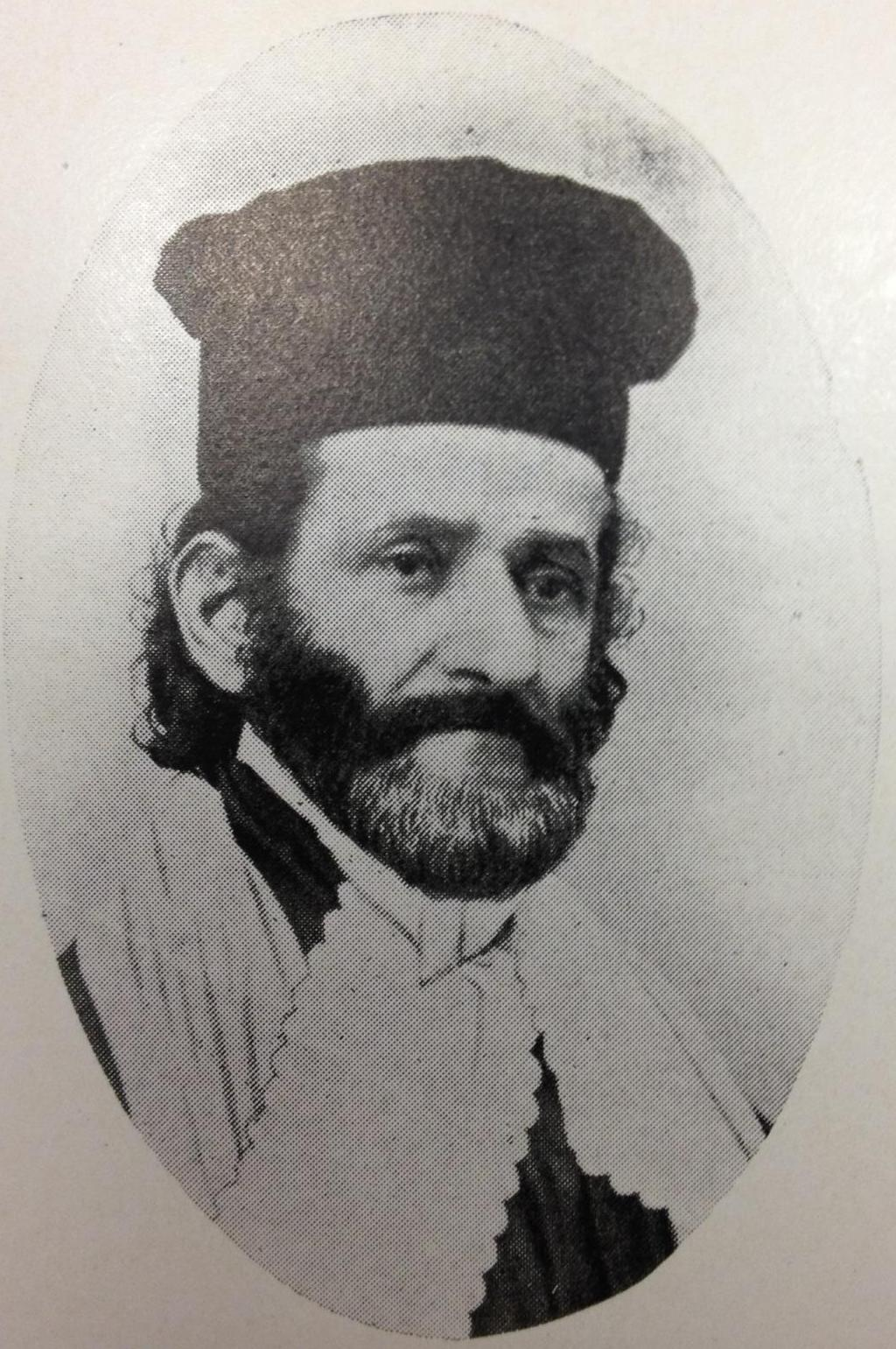 רבי יששכר בר (ברנרד) אילווי